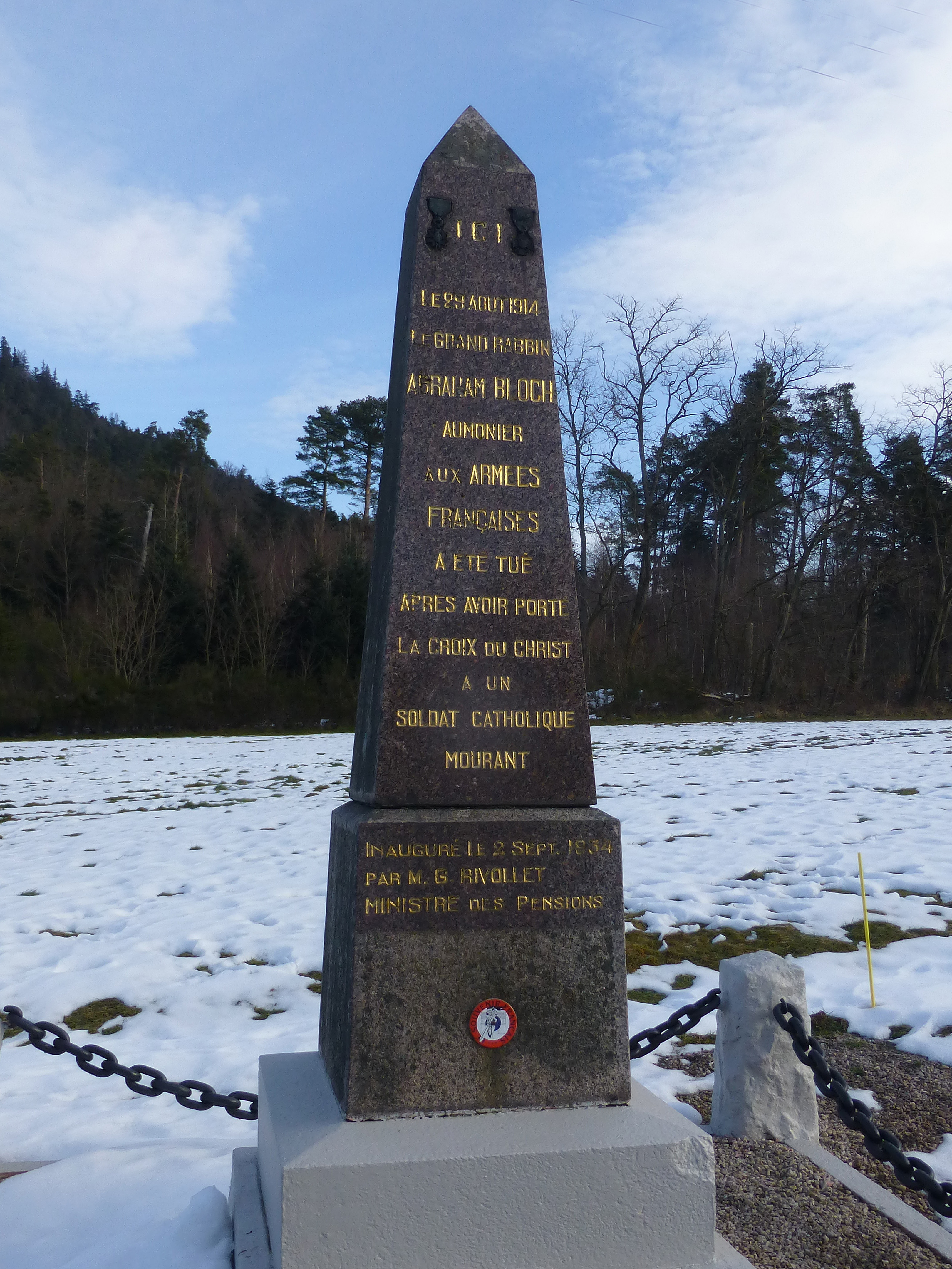 Stèle d'Abraham Bloch au col d'Anozel (Taintrux, Vosges)